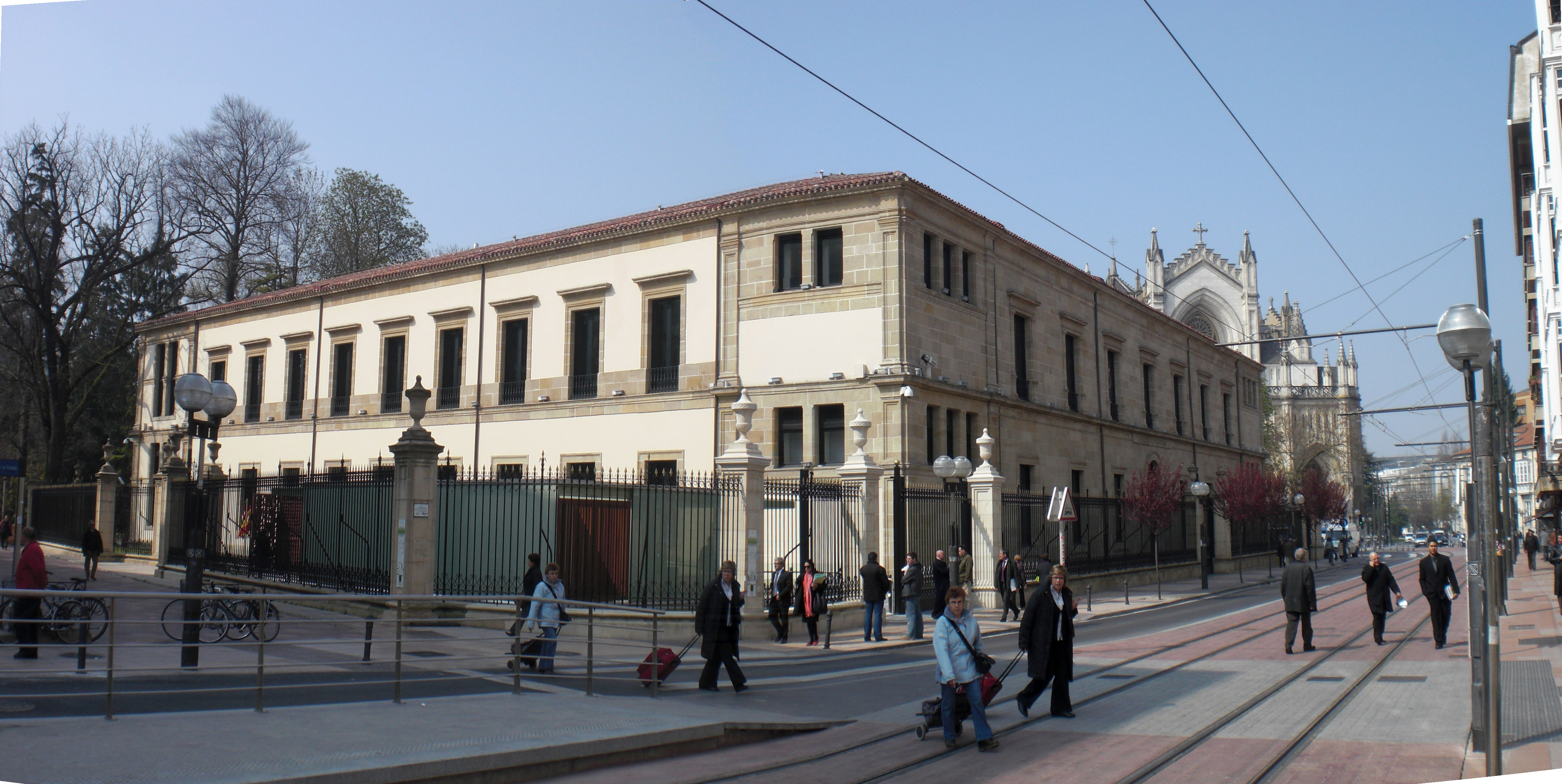 Eusko Legebiltzarraren eraikina, Gasteiz.